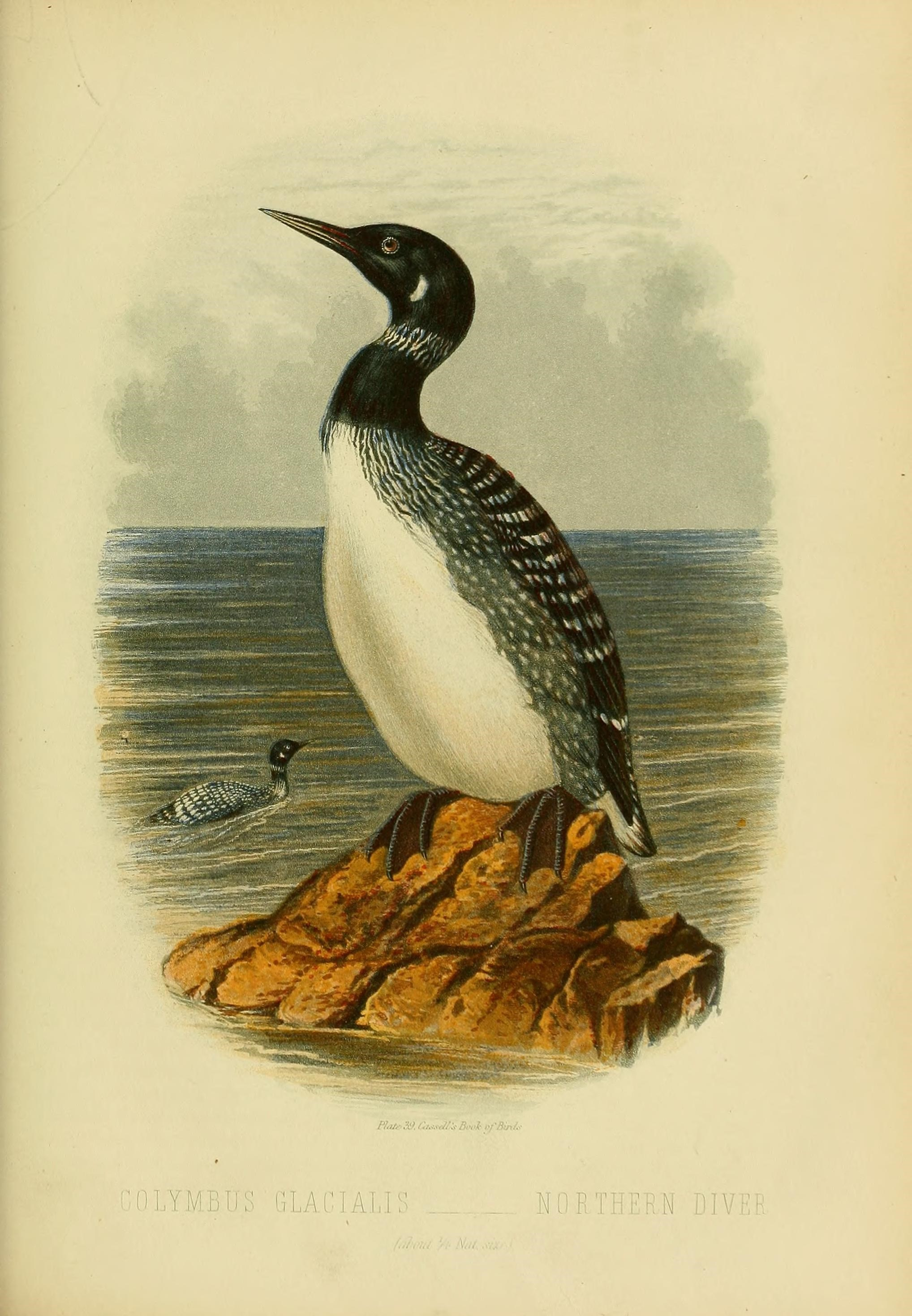 JJS